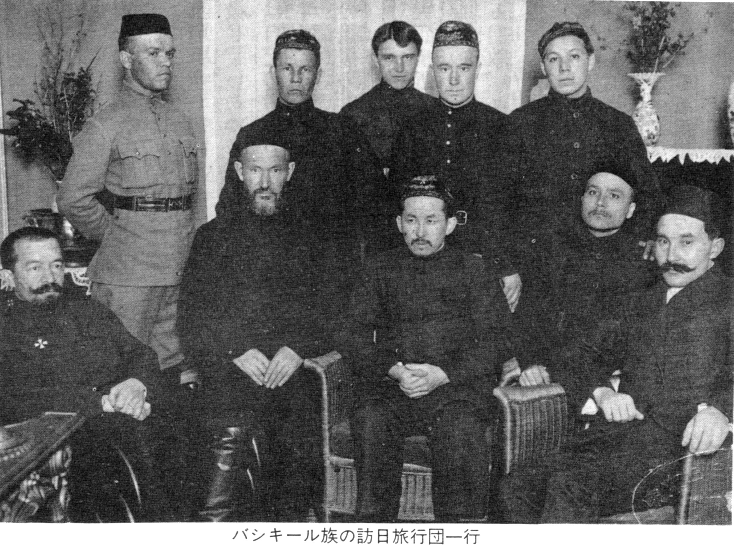 Башҡортса: Башҡорт хәрби-милли идаралығы етәкселәре. 1920 йыл. Уңда идаралыҡтың штаб начальнигы Ғәлимйән Таған ултыра, уртала идаралыҡтың рәйесе Ғәбделхай Ҡорбанғәлиев һәм һул яҡтан атаман Семенов янындағы башҡорт вәкиле Солтангәрәй Бикмәев.